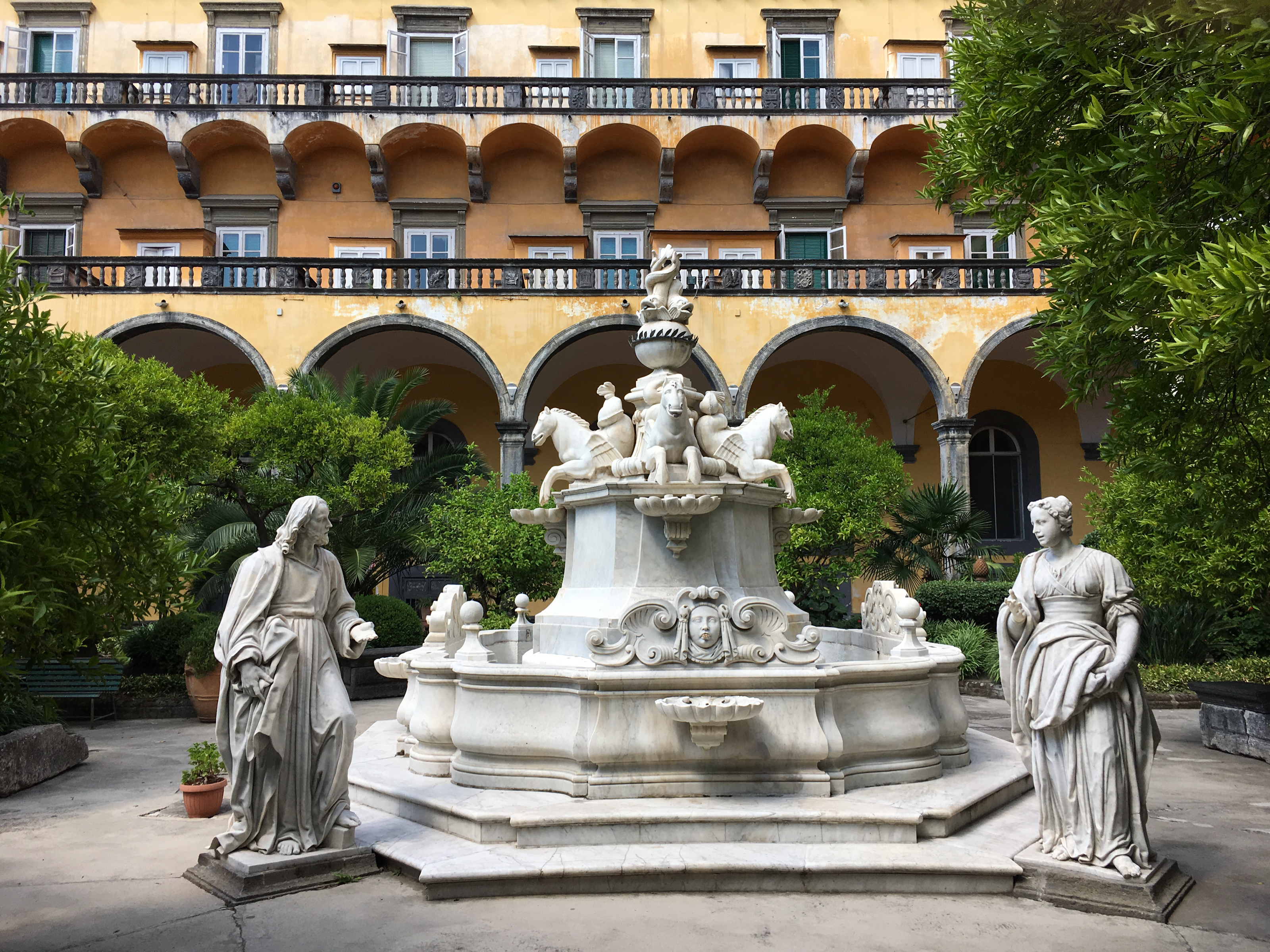 Matteo Bottiglieri, Cristo e la Sammaritana al pozzo, 1783 - Chiostro di San Gregorio Armeno (Napoli)